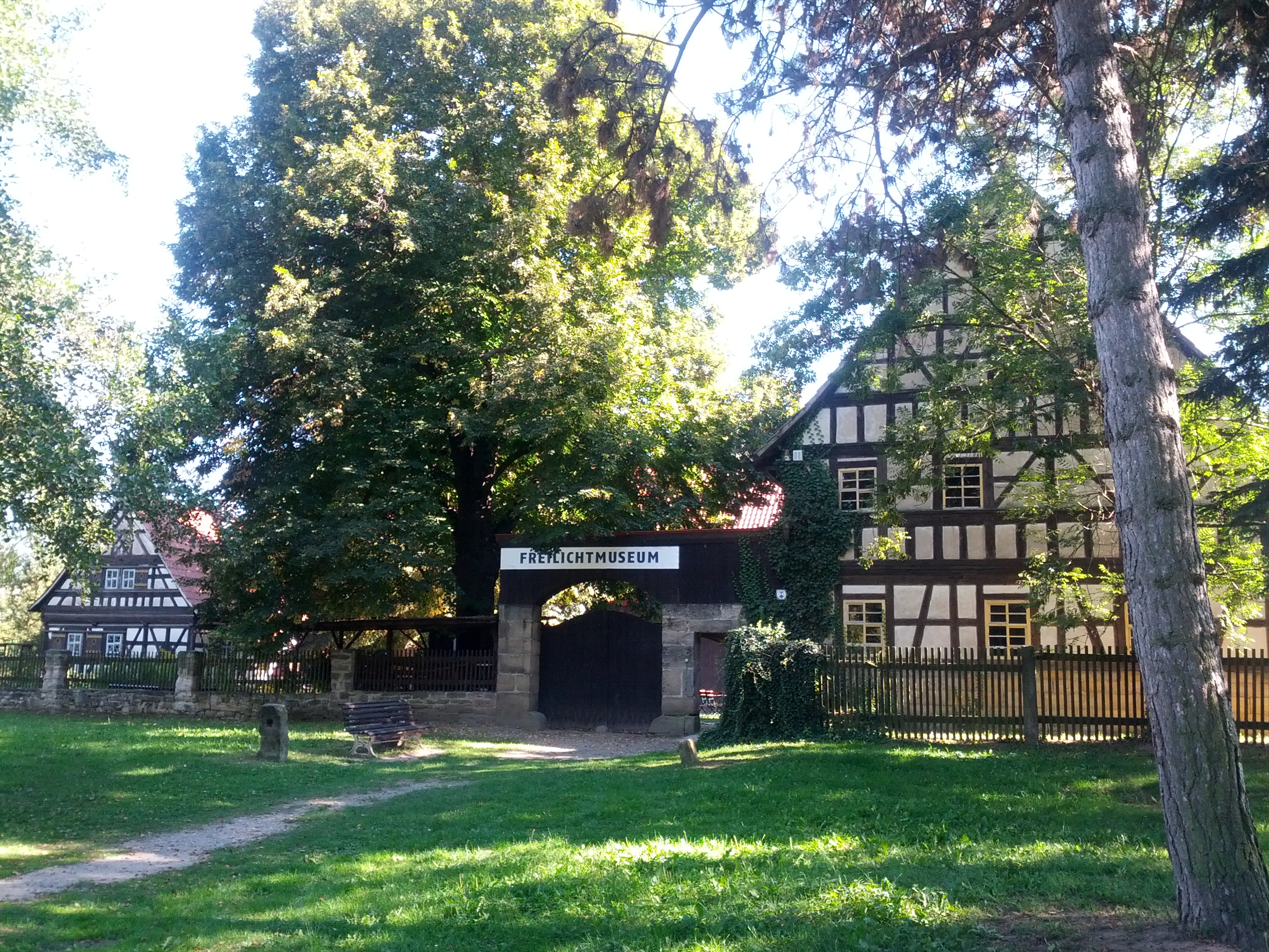 Freilichtmuseum Thüringer Bauernhäuser Rudolstadt, Denkmalensemble im Heinrich-Heine-Park an der Großen Wiese 2; Eingang